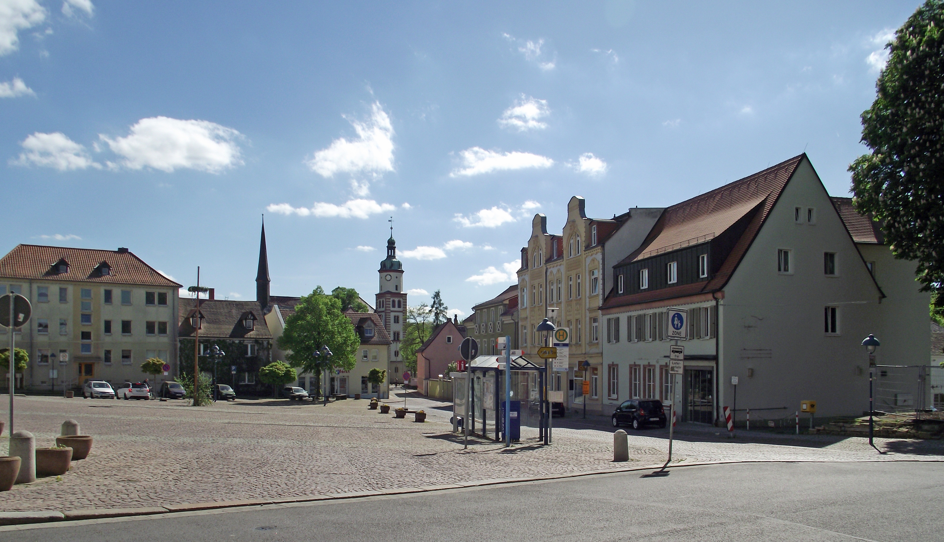 Der Röthaer Markt am 1.Mai 2018.